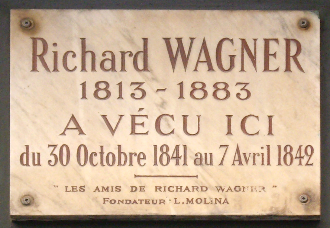 Plaque apposée au n° 14 de la rue Jacob, Paris 6e, où vécut Richard Wagner (1813-1883) du 30 octobre 1841 au 7 avril 1842.